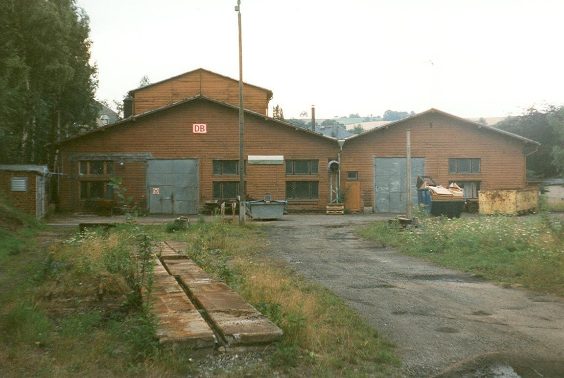 Bild des Bahnbetriebswerk Thum aus dem Jahr 1995